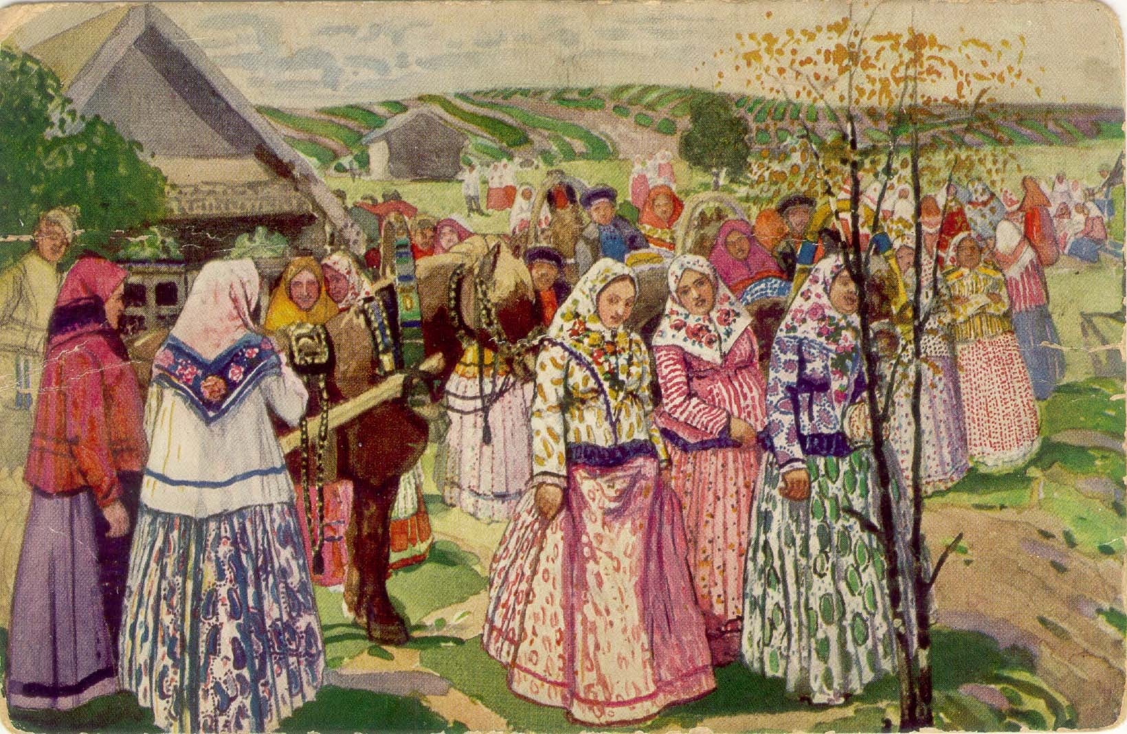 Праздник в деревне летом (Гуляние, Троицын день)